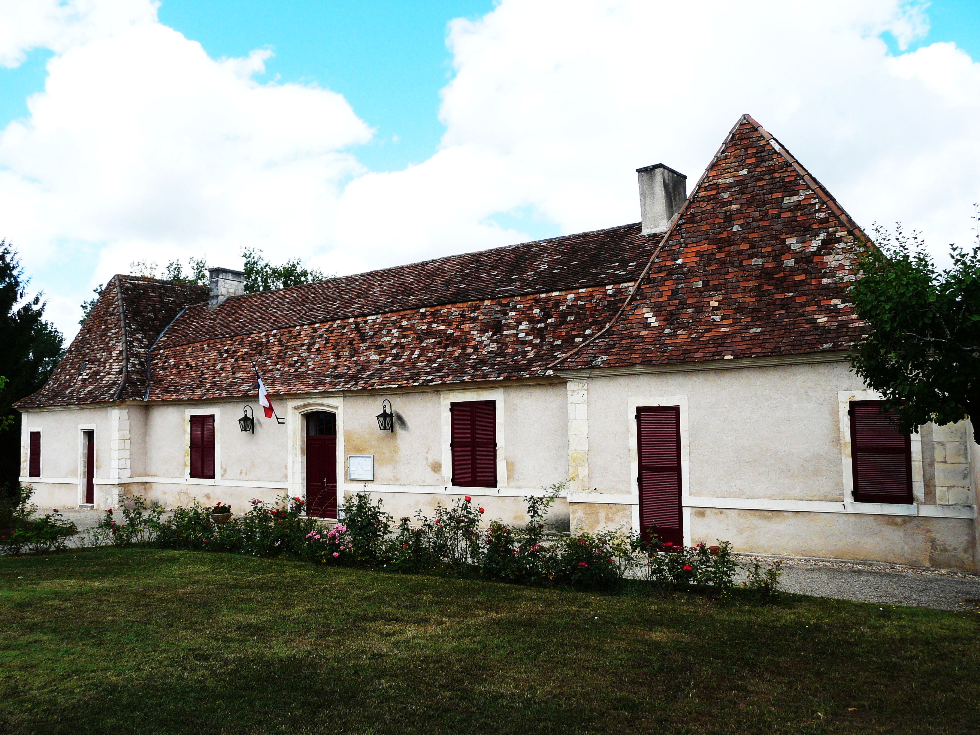 La mairie de Saint-Médard-de-Mussidan, Dordogne, France.